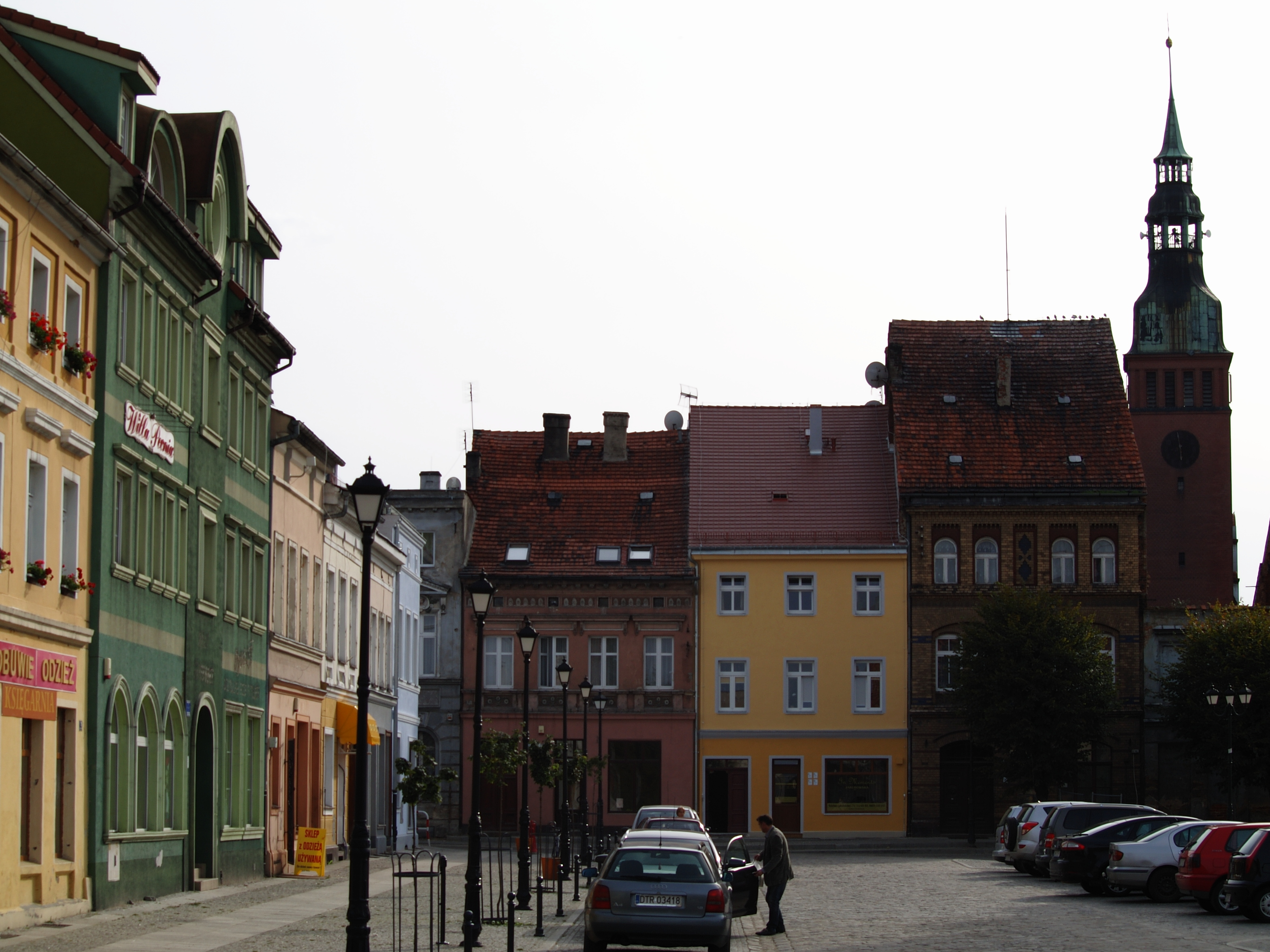 Prusice - widok na południowo zachodnią część rynku